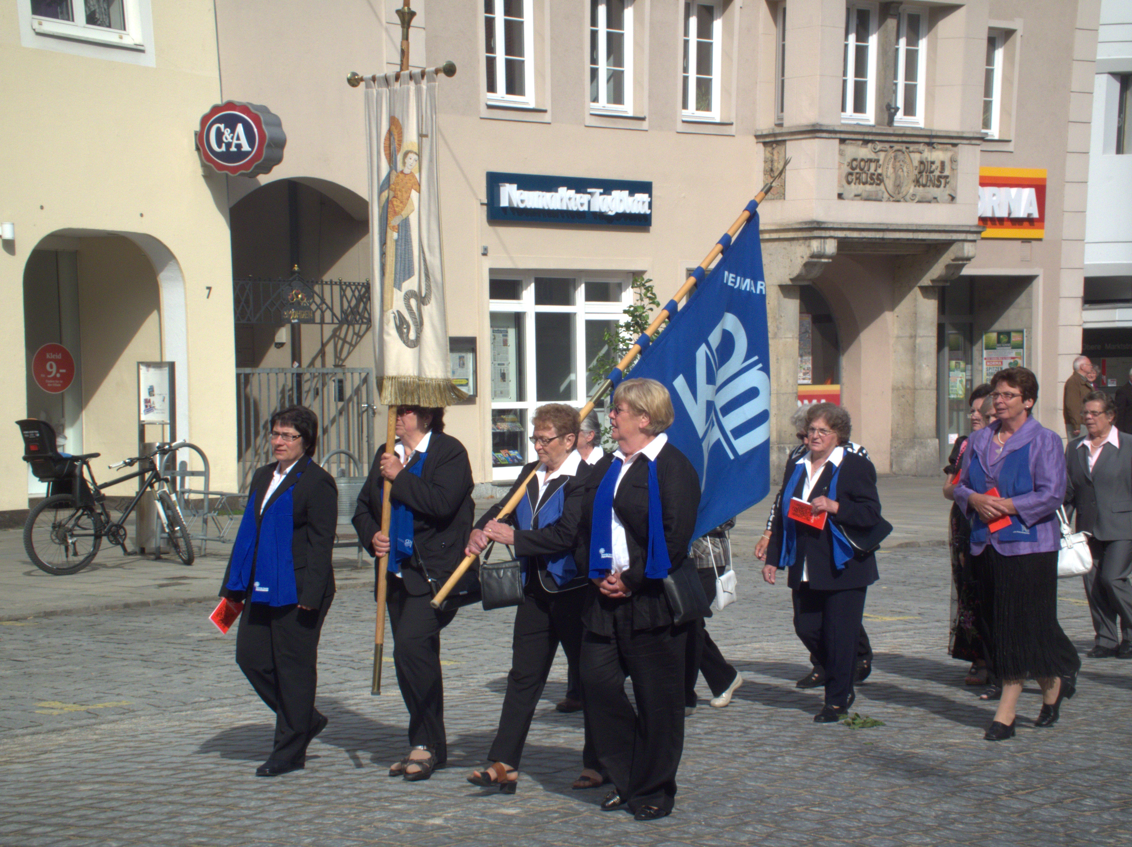 Die gemeinsame Fronleichnamsprozession der beiden Stadtpfarreien St. Johannes und der Hofkirche in Neumarkt am 07. Juni 2012 i